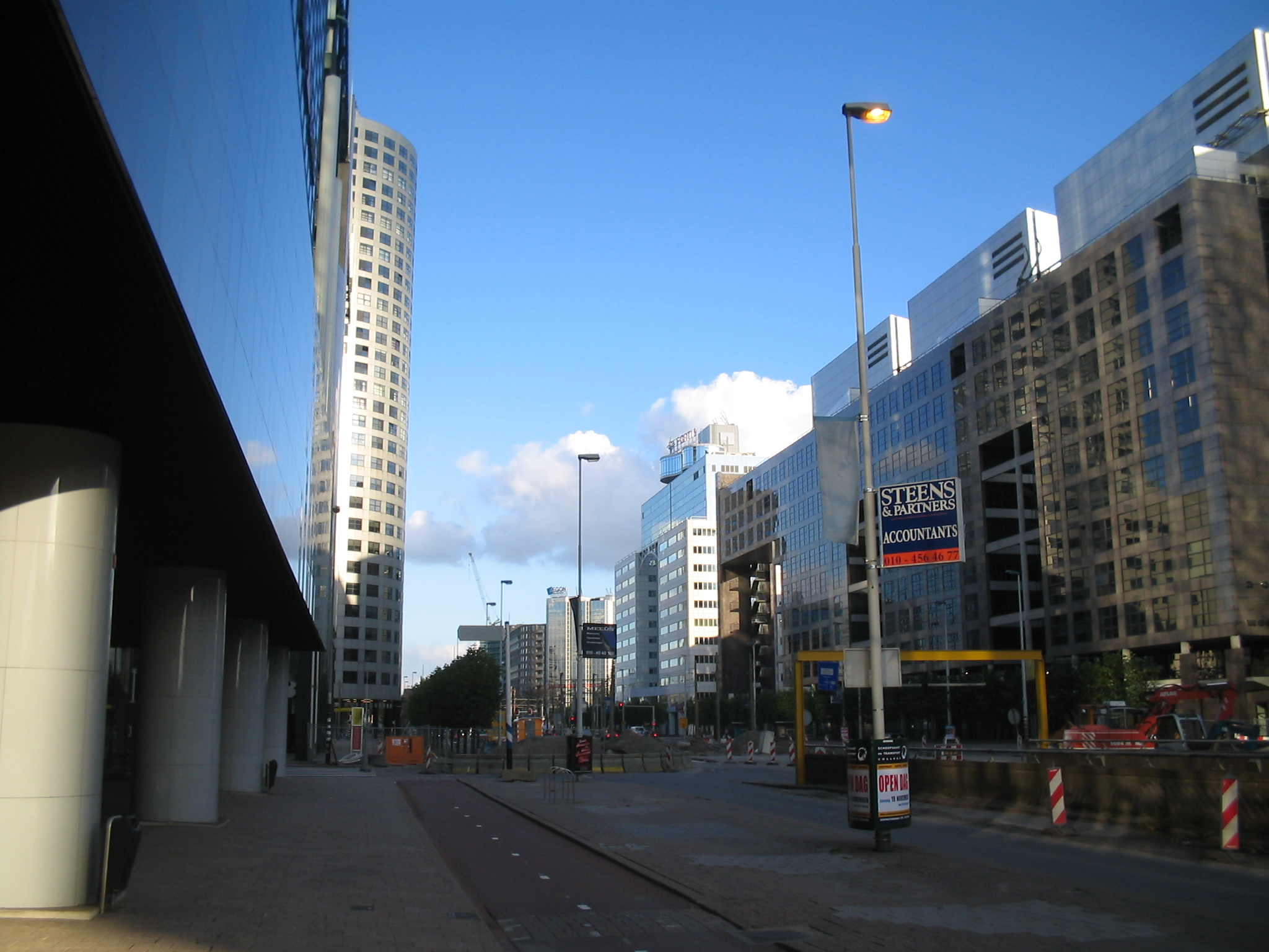 Weena, Rotterdam